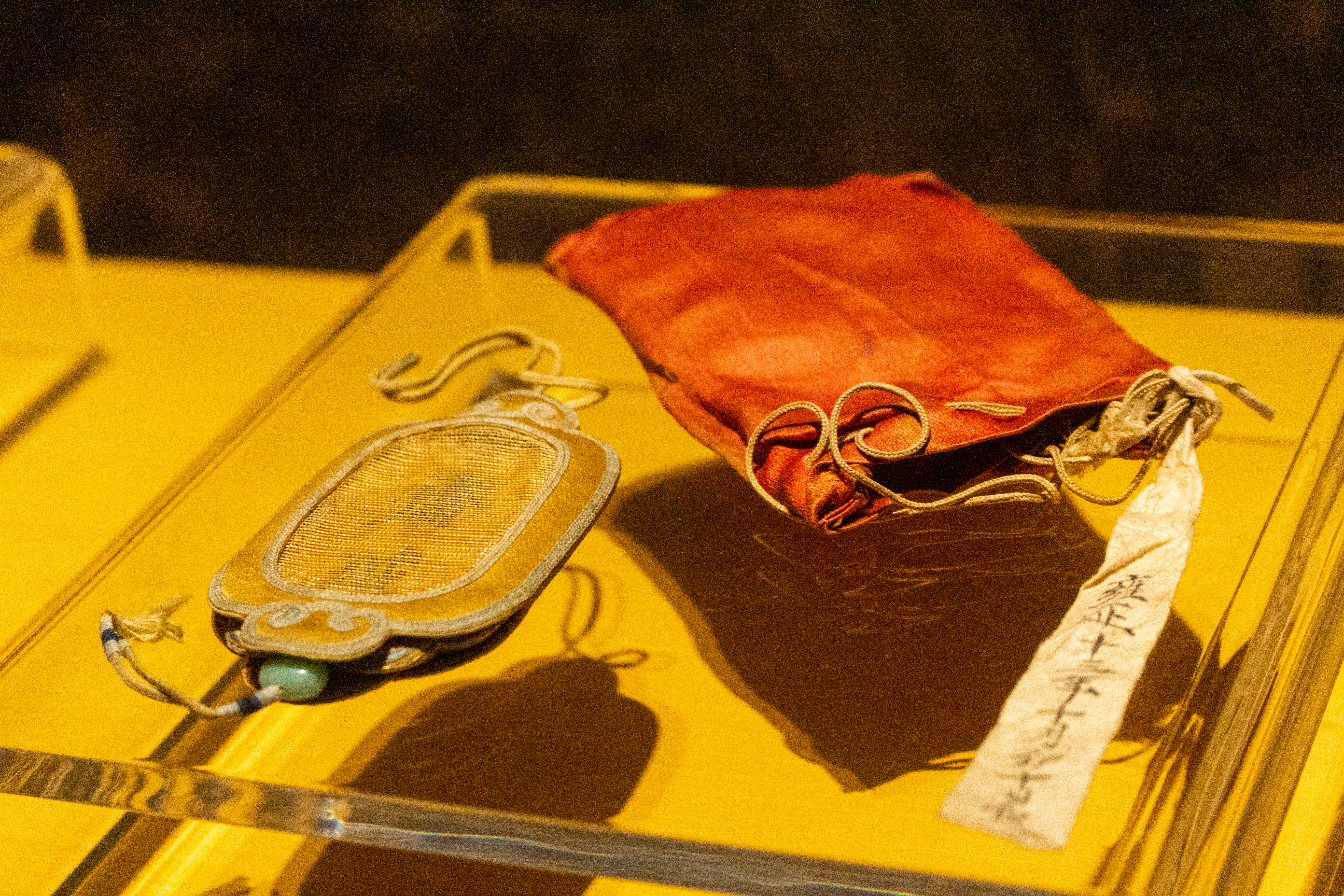 清代黄绫斋戒牌，摄于上海奉贤博物馆“雍正故宫文物大展”